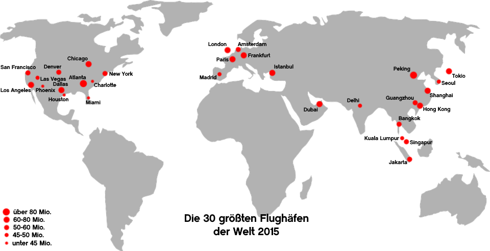 Karte mit den 30 größten Flughäfen der Welt nach Passagieraufkommen